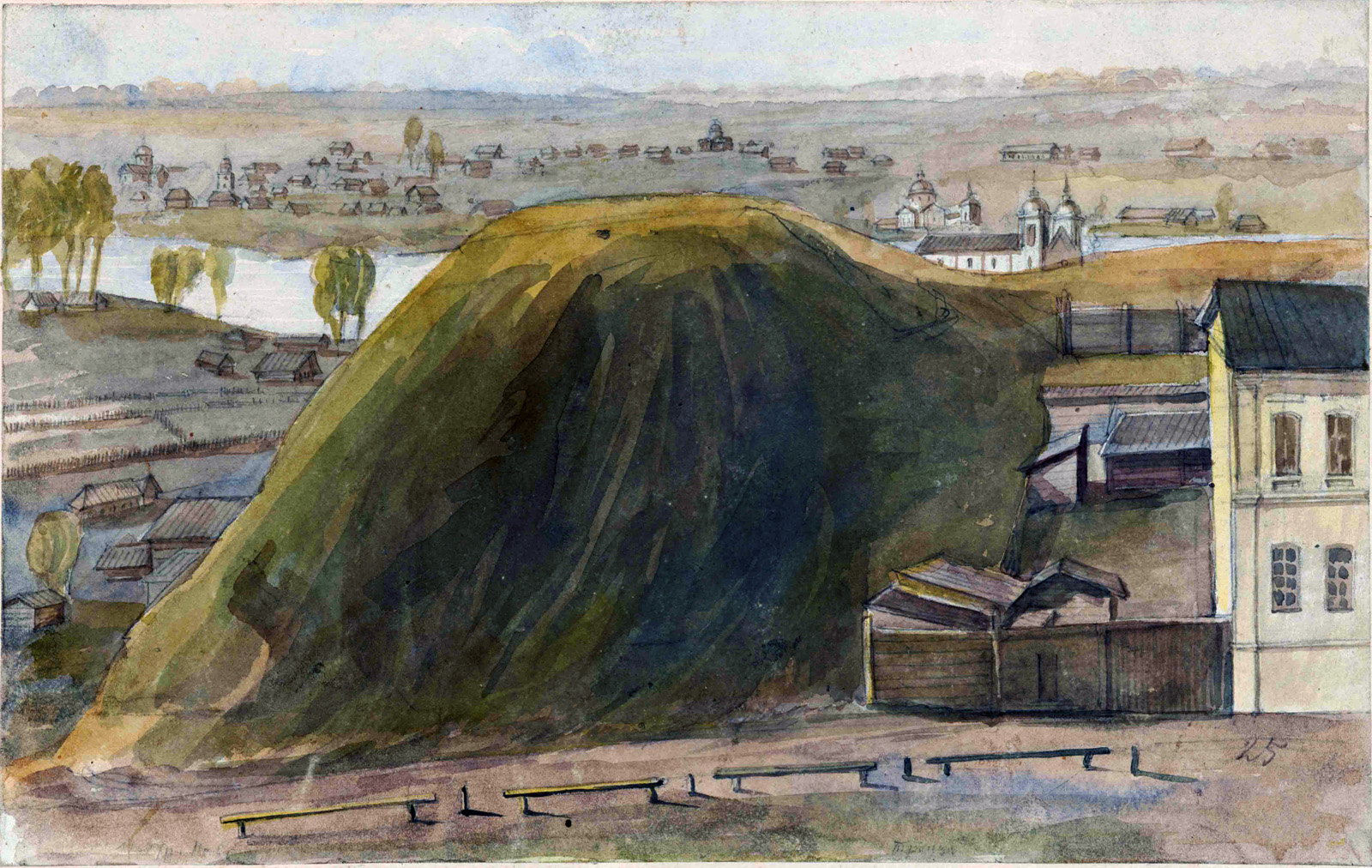 Беларуская (тарашкевіца): Магілёў (Mahiloŭ), Касьцерня (Kaściernia). Вал старога места